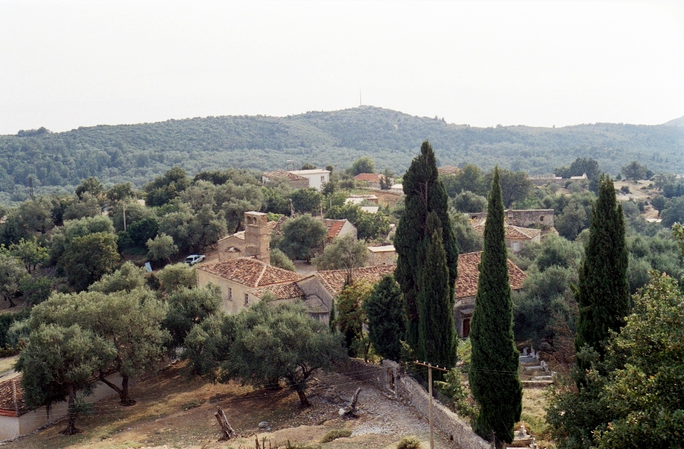 Vuno, Vlorë District, Albania